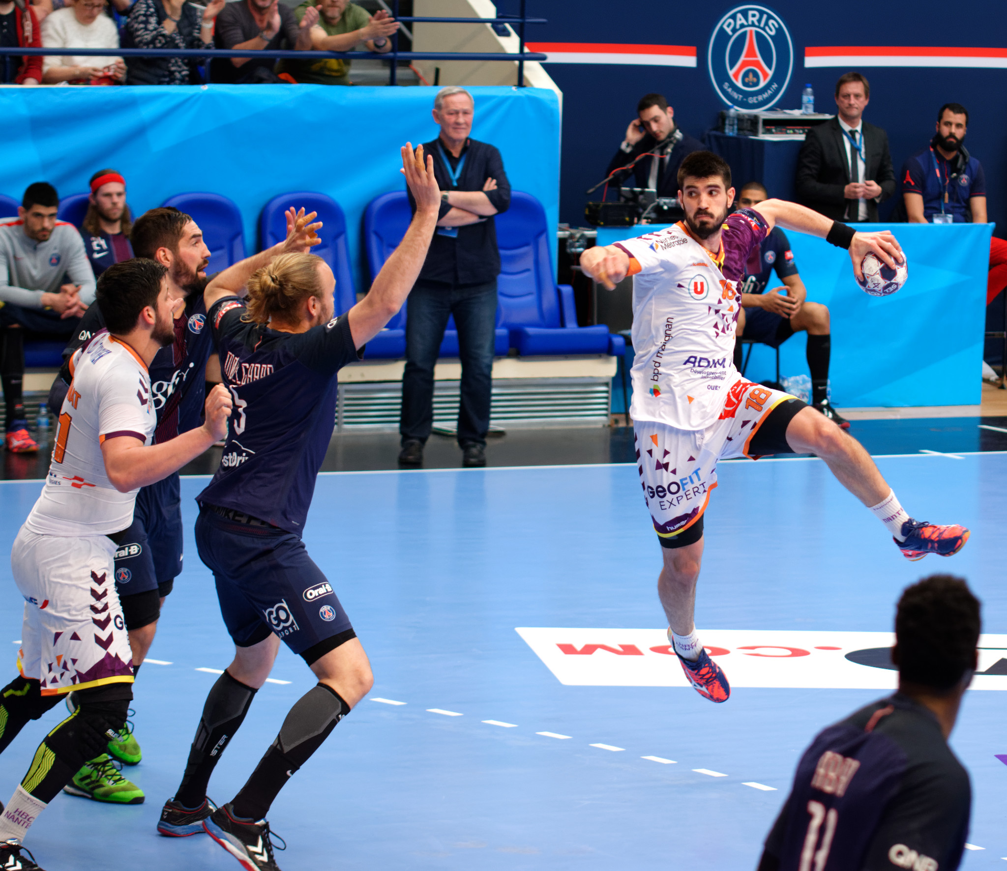 Huitième de finale de la ligue des champions 2016-17 entre le PSG et le HBC Nantes. A Coubertin, le 1er avril 2017.